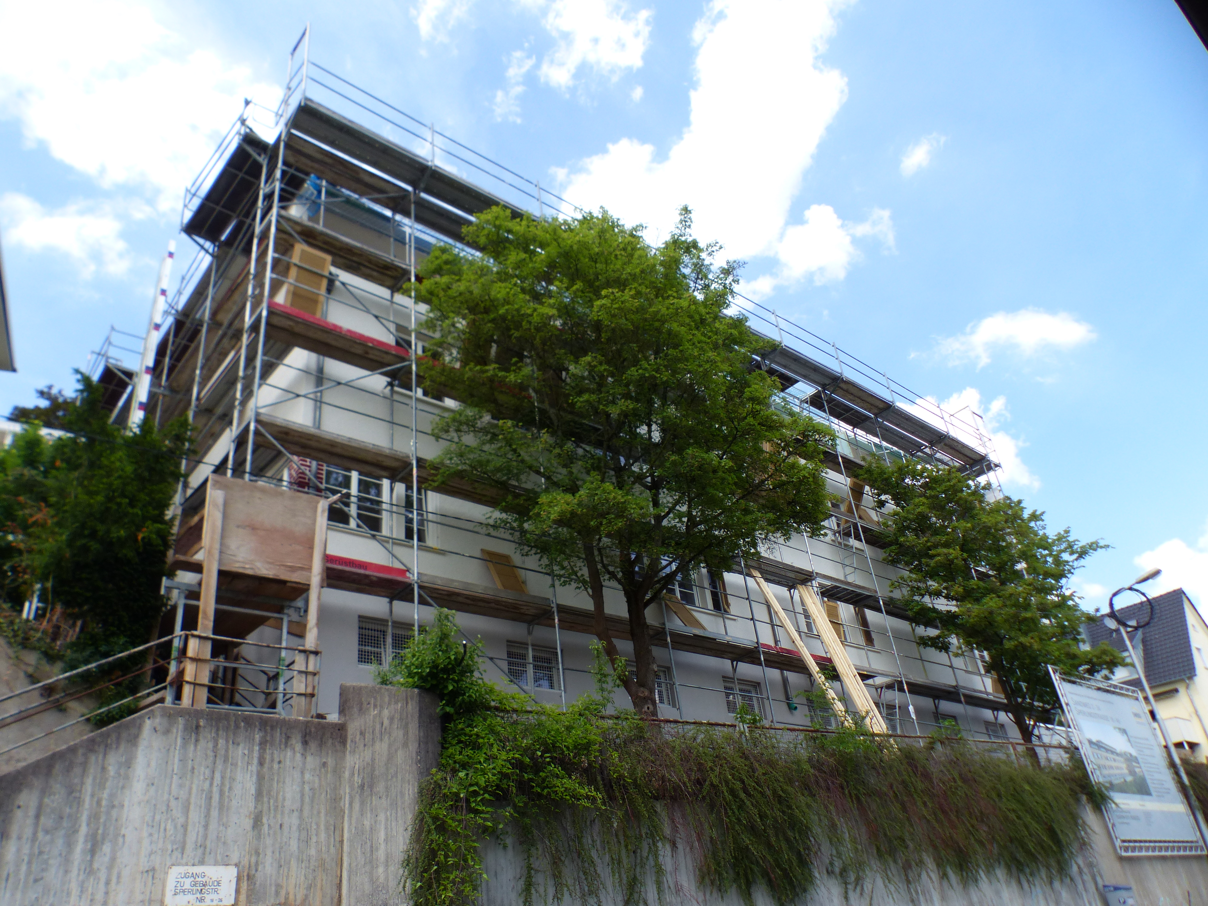 Reihenhaus, Sperlingstraße 20, 22, 24, 26, Stadtteil: Südheim, Stadtbezirk: Süd, Stadt: Stuttgart, Land: Deutschland